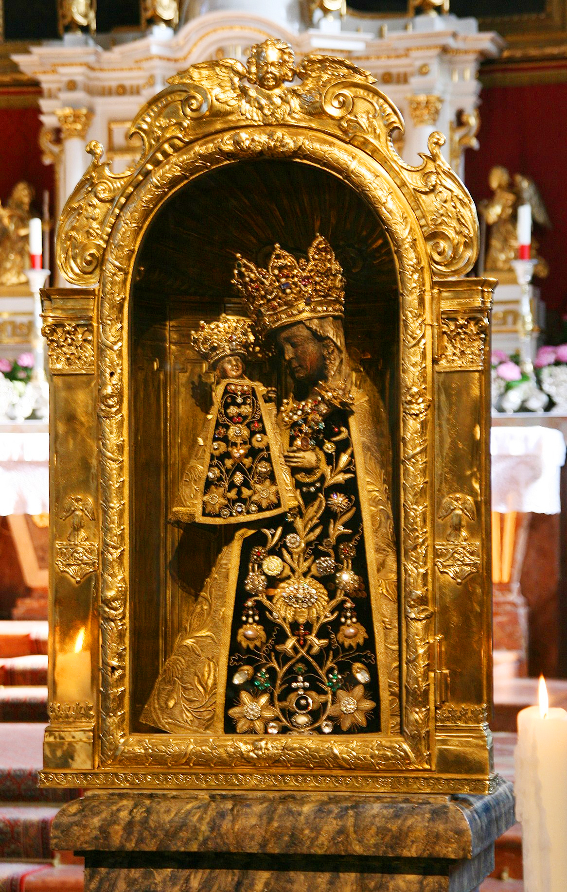 Das Gnadenbild der Gnadenkapelle in Altötting (Landkreis Altötting, Oberbayern). Die frühgotische Statue einer stehenden Muttergottes mit dem Jesus-Kind kam um 1330 nach Altötting. Die Fotografie wurde in der Altöttinger Stiftspfarrkirche aufgenommen, wohin das Gnadenbild am 23.02.2011 wegen Arbeiten in der Gnadenkapelle gebracht war. Dies bedeutete eine seltene Gelegenheit zur Bildaufnahme, da die Innenräume der Gnadenkapelle nicht fotografiert werden dürfen.